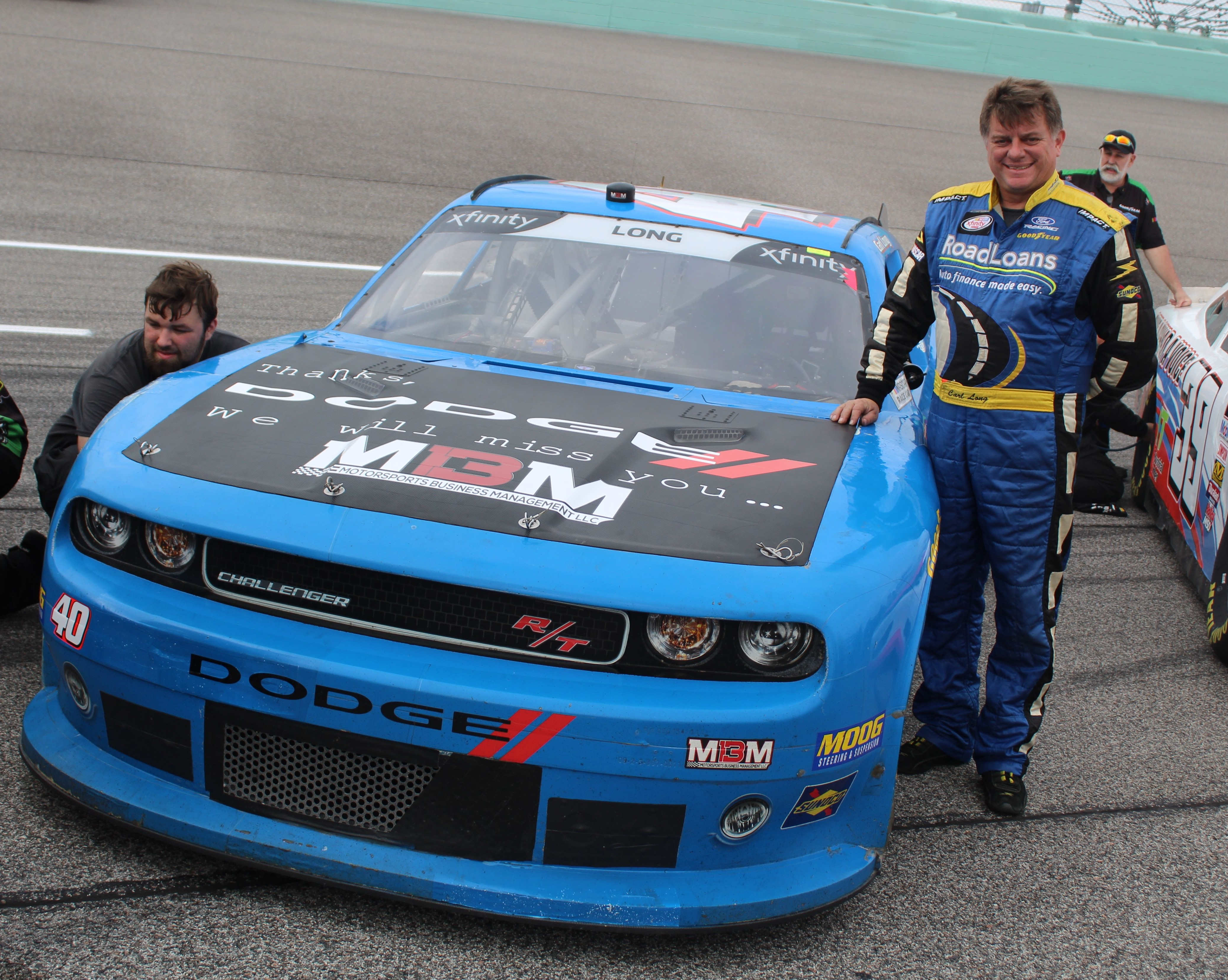 lost race for dodge / carl long